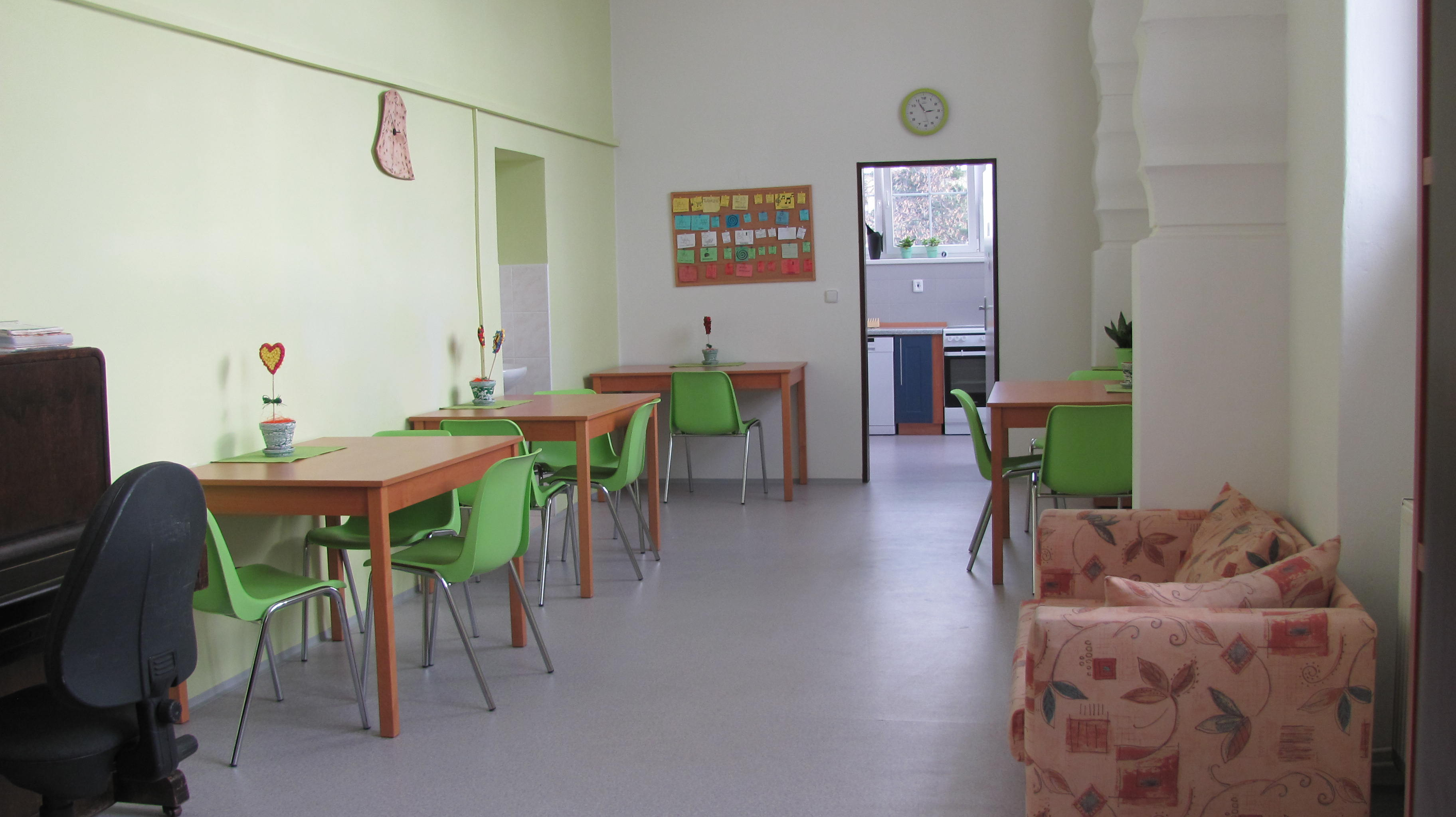 Jídelna